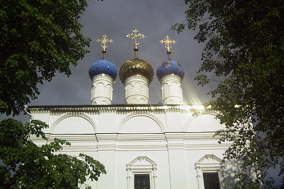 Собор Рождества Богородицы (Владимирская область, Александров, село Лукьянцево (Лукианова пустынь))